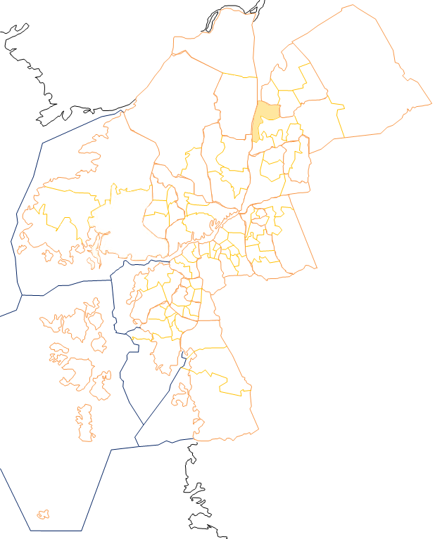 Karta som visar primärområdes belägenhet i Göteborg